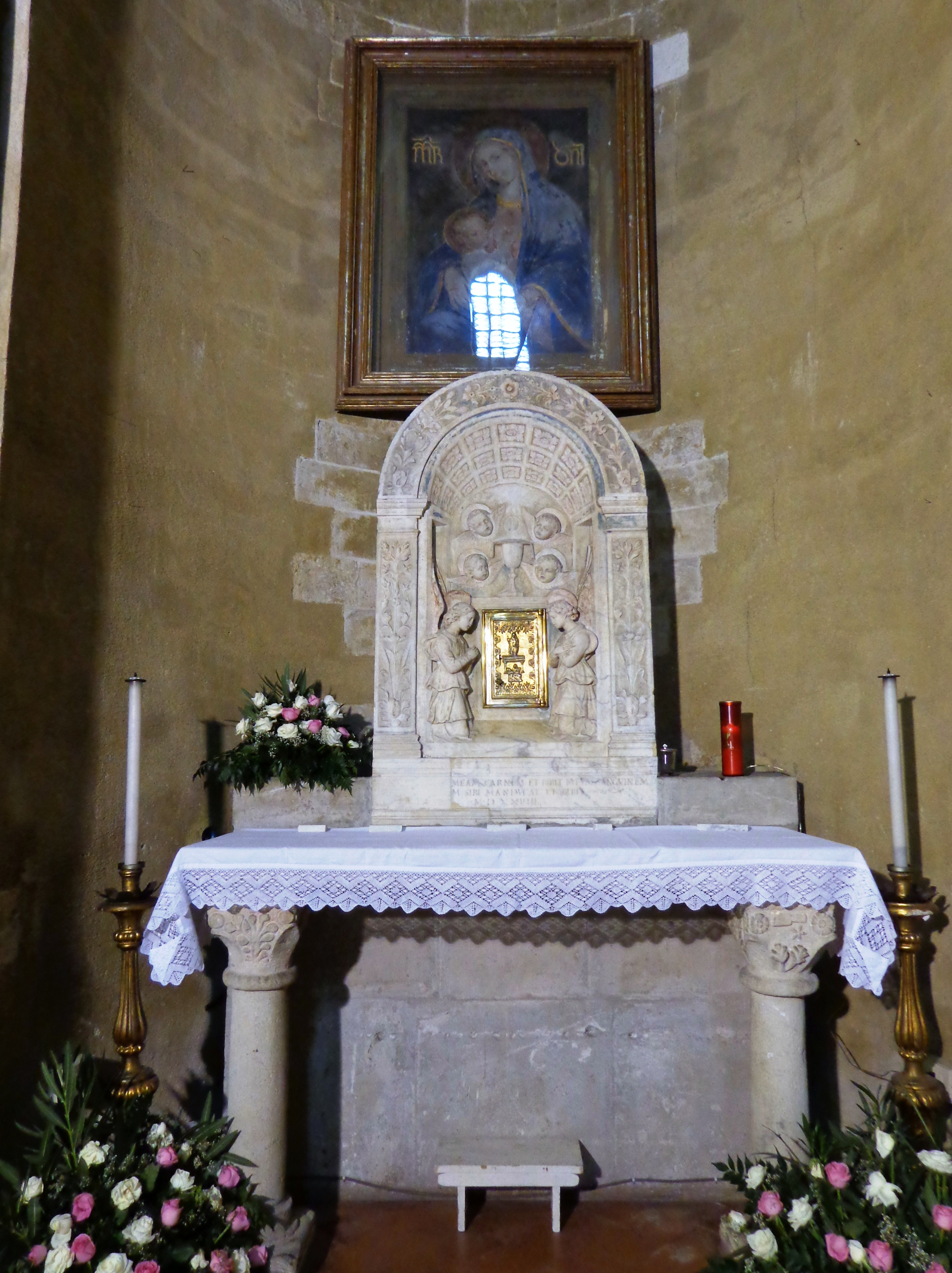 Chiesa_Cancelliere_05